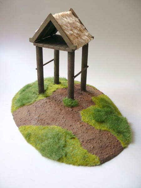 Elemento de escenografía para el juego de miniaturas de El Señor de los Anillos que representa un almacén de Rohan, construído a partir de madera de balsa.